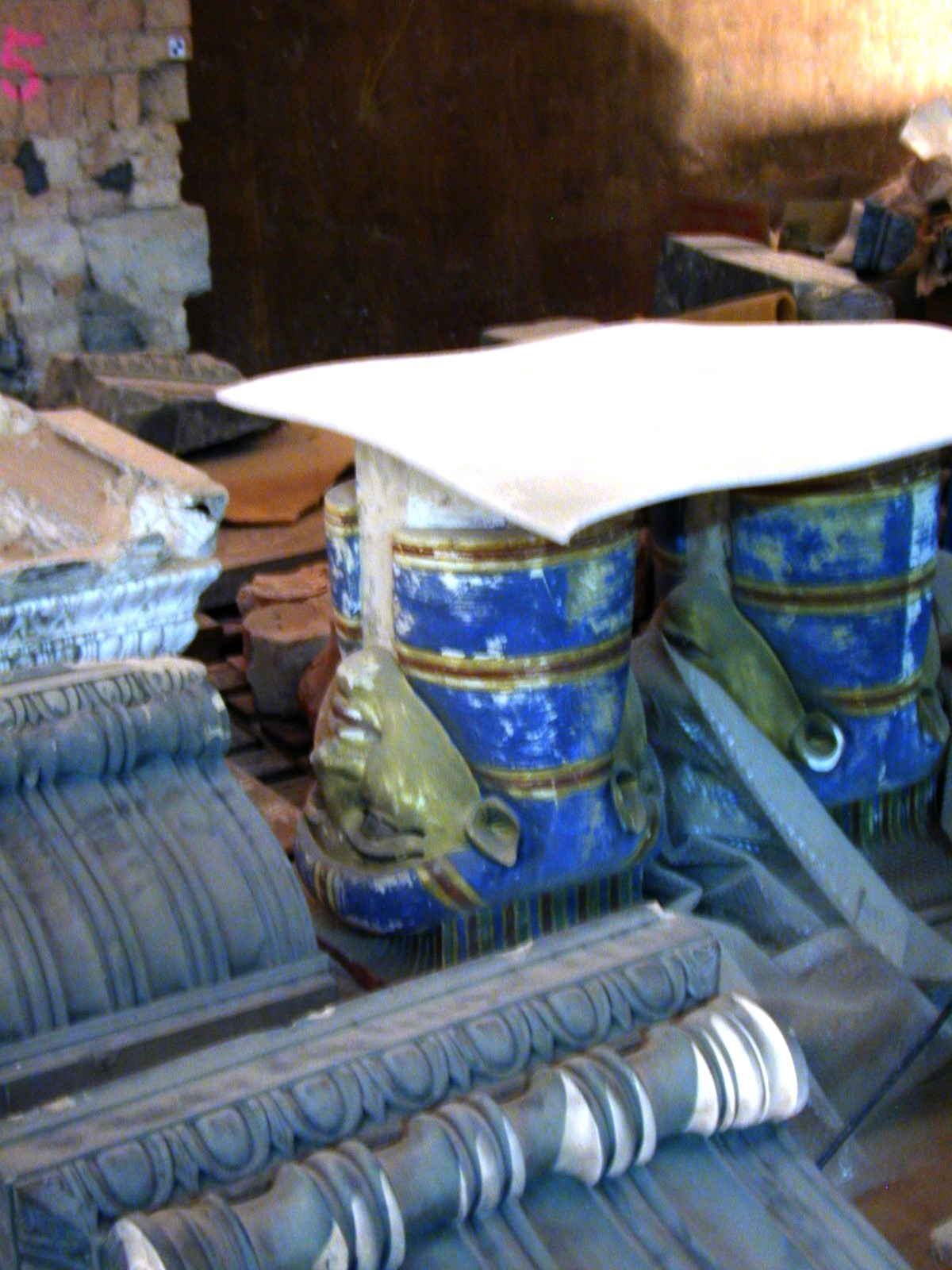 Berlin, Neues Museum - eingelagerte Bauteile